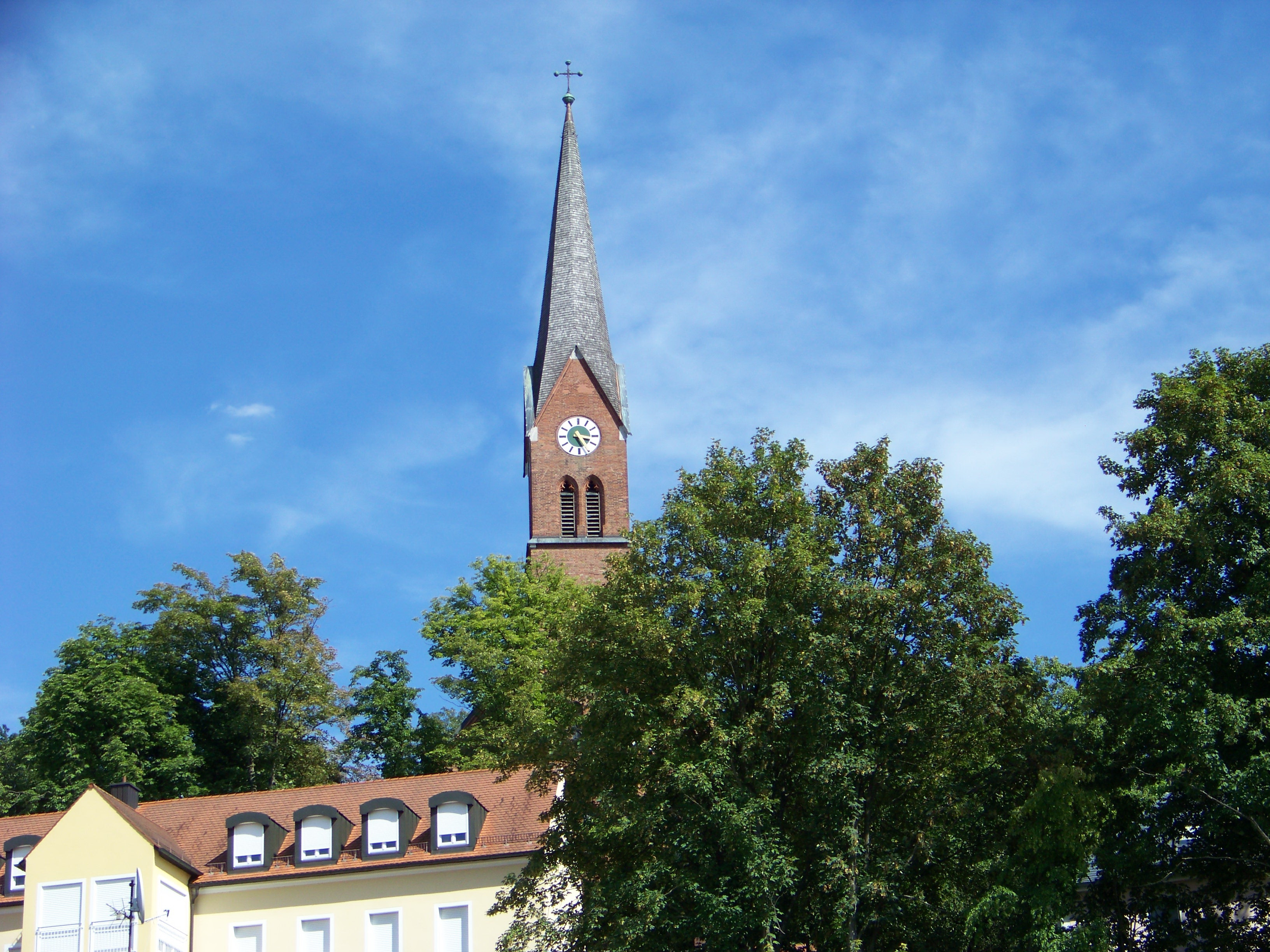 Bad Abbach, Schloßbergweg 23. Katholische Pfarrkirche St. Nikolaus. Saalkirche mit Satteldach, Chor fünfseitig geschlossen, schlanker Turm mit Spitzhelm, neugotisch, 1849/50 nach Plänen von Joseph Tanera; mit Ausstattung.